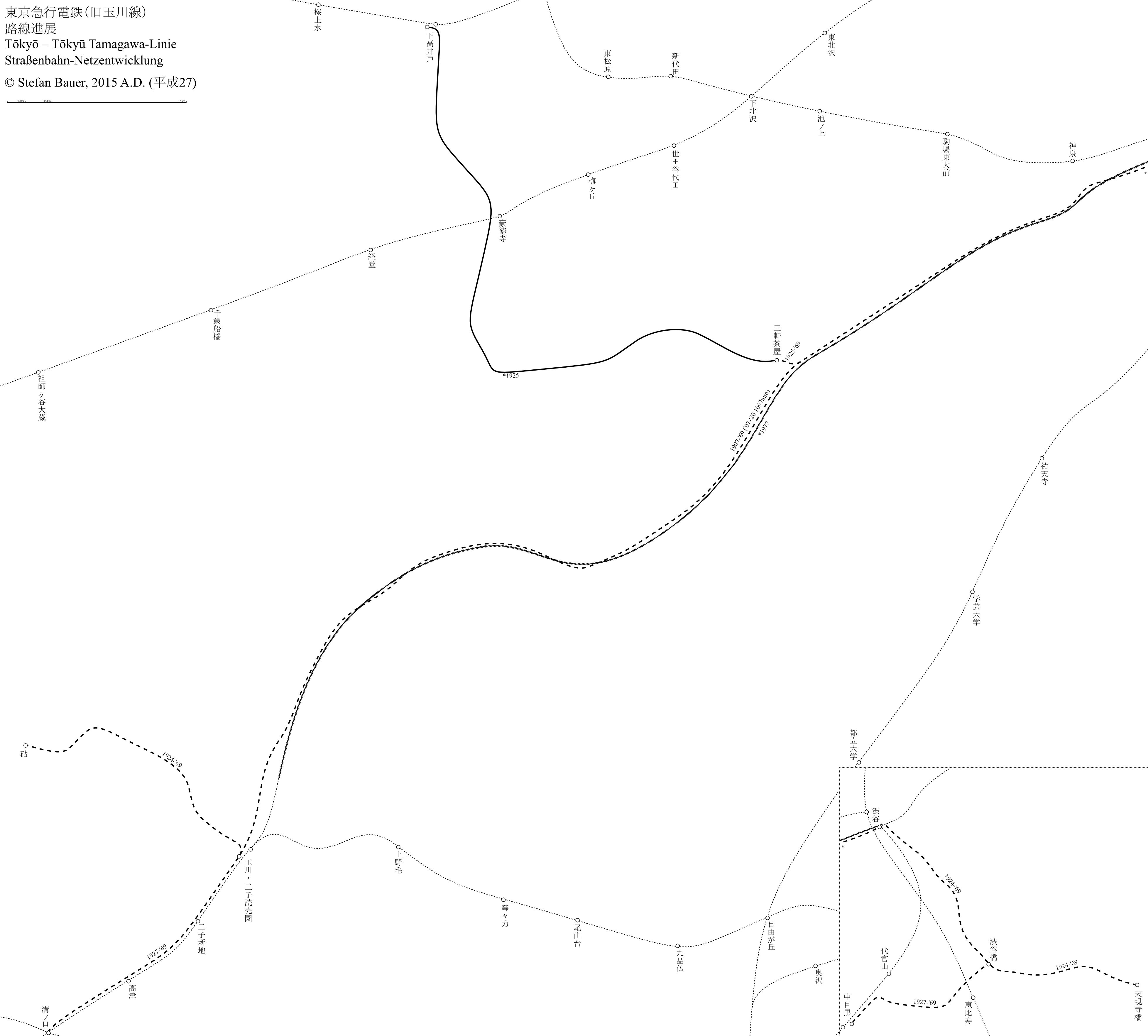 東京急行電鉄の旧玉川線の路線進展図